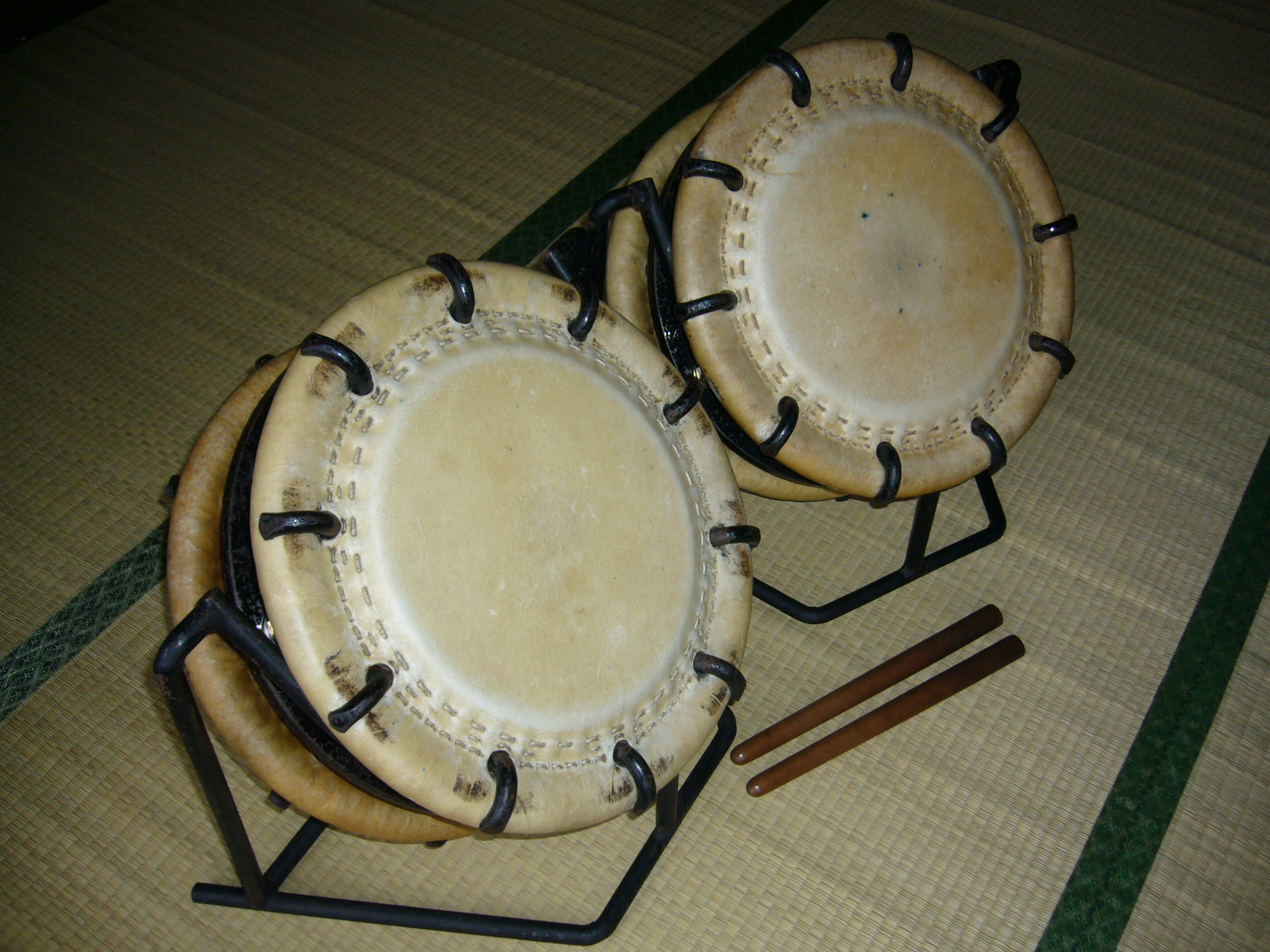 japanese-small-drum,tsuke-daiko,katori-city,japan